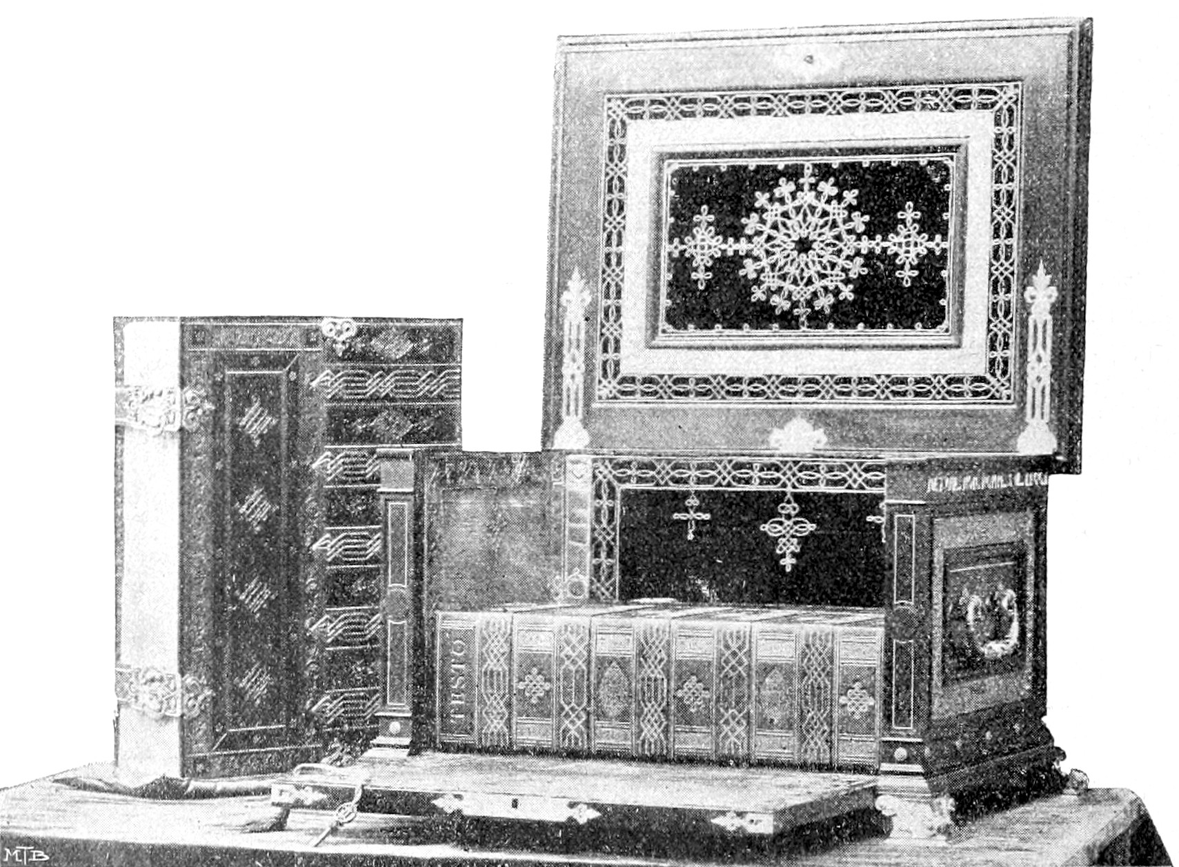 Cofano realizzato da Luca Beltrami per il dono della prima copia della riproduzione del Codice Atlantico